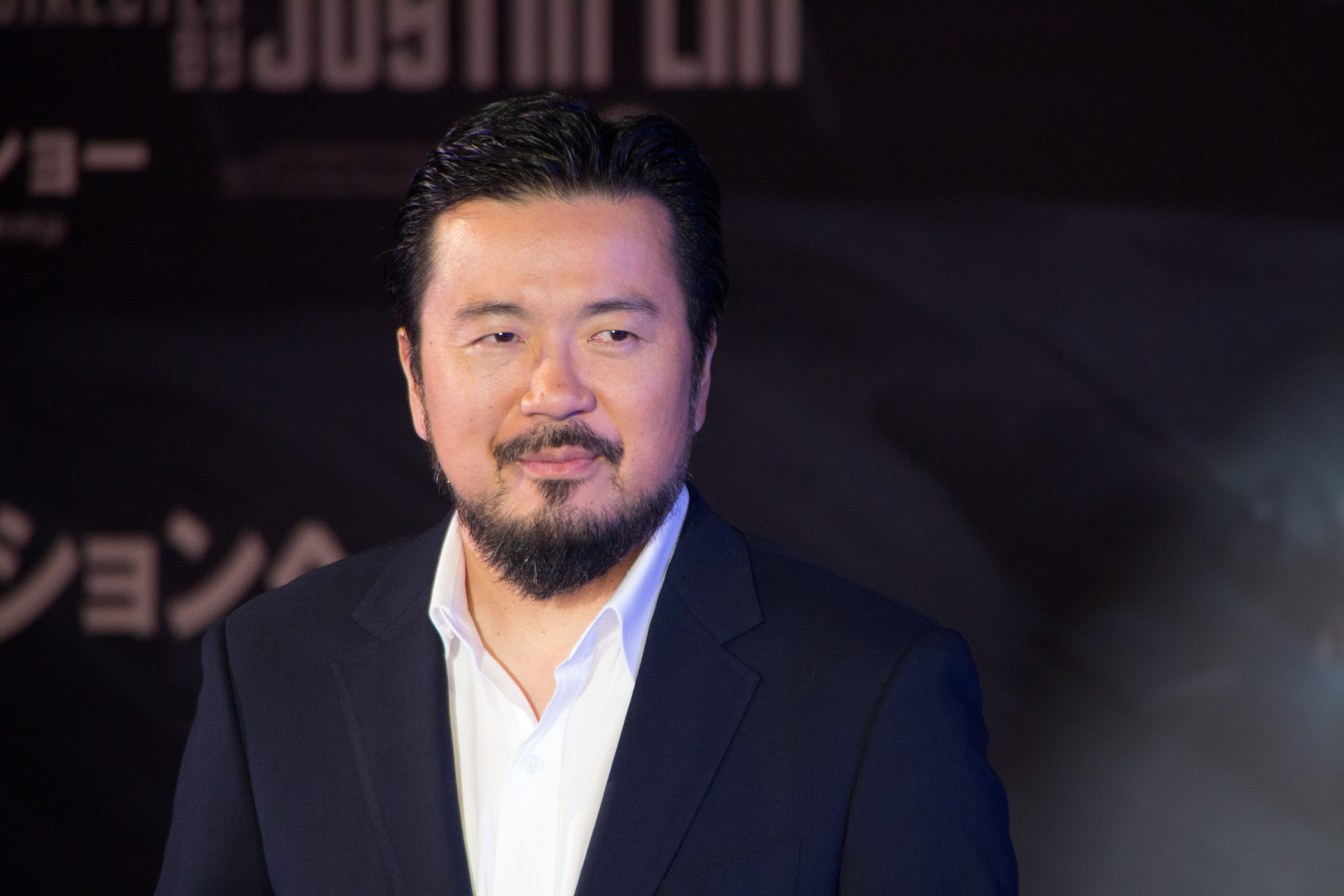 スター・トレック BEYOND ジャパン・プレミア レッドカーペット ジャスティン・リン